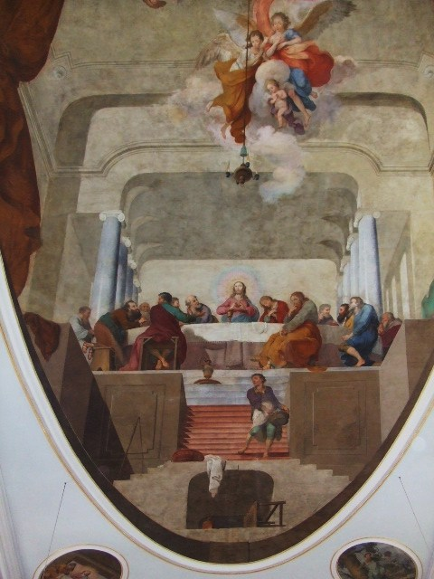 Deckengemälde